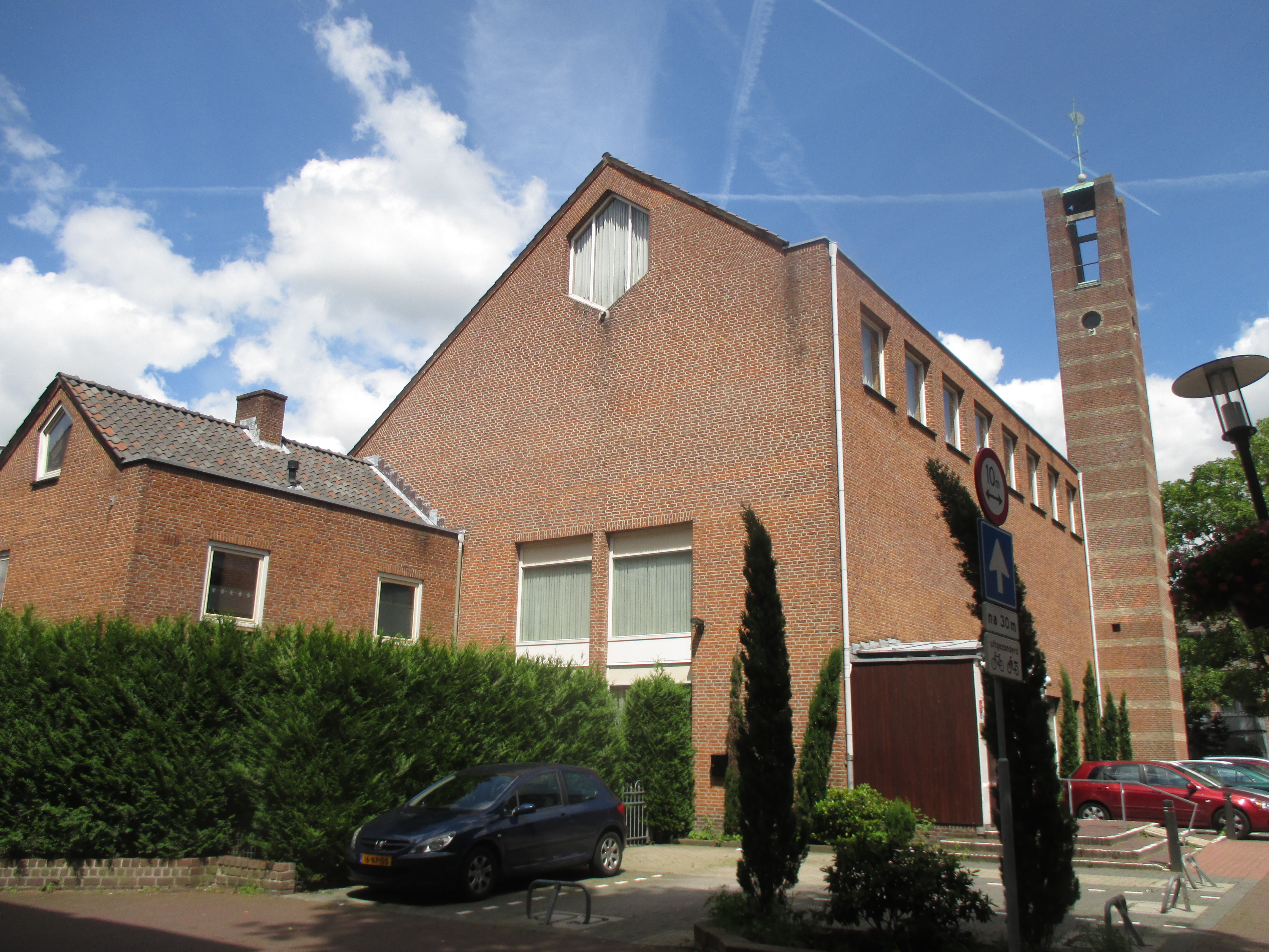 Christelijk Gereformeerde Ichtus Kerk in Amersfoort